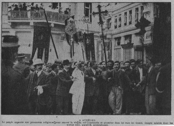 Une procession à Athènes de gens pour soutenir Constantin, juillet 1915.